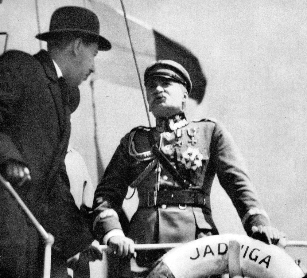 Marshall J.Pilsudski and minister E.Kwiatkowski onboard SS Jadwiga